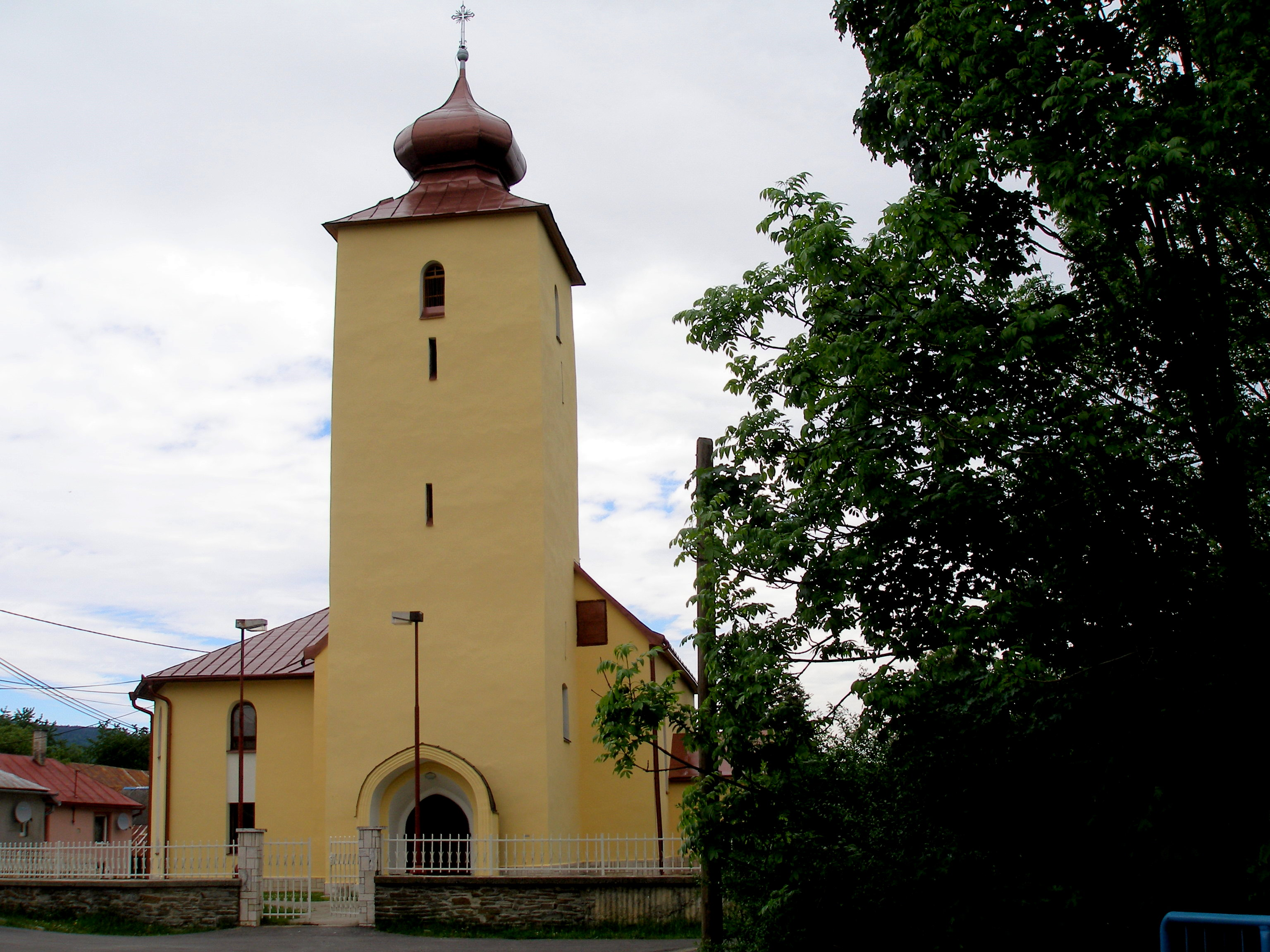 Obec Krásna Lúka okres Sabinov.